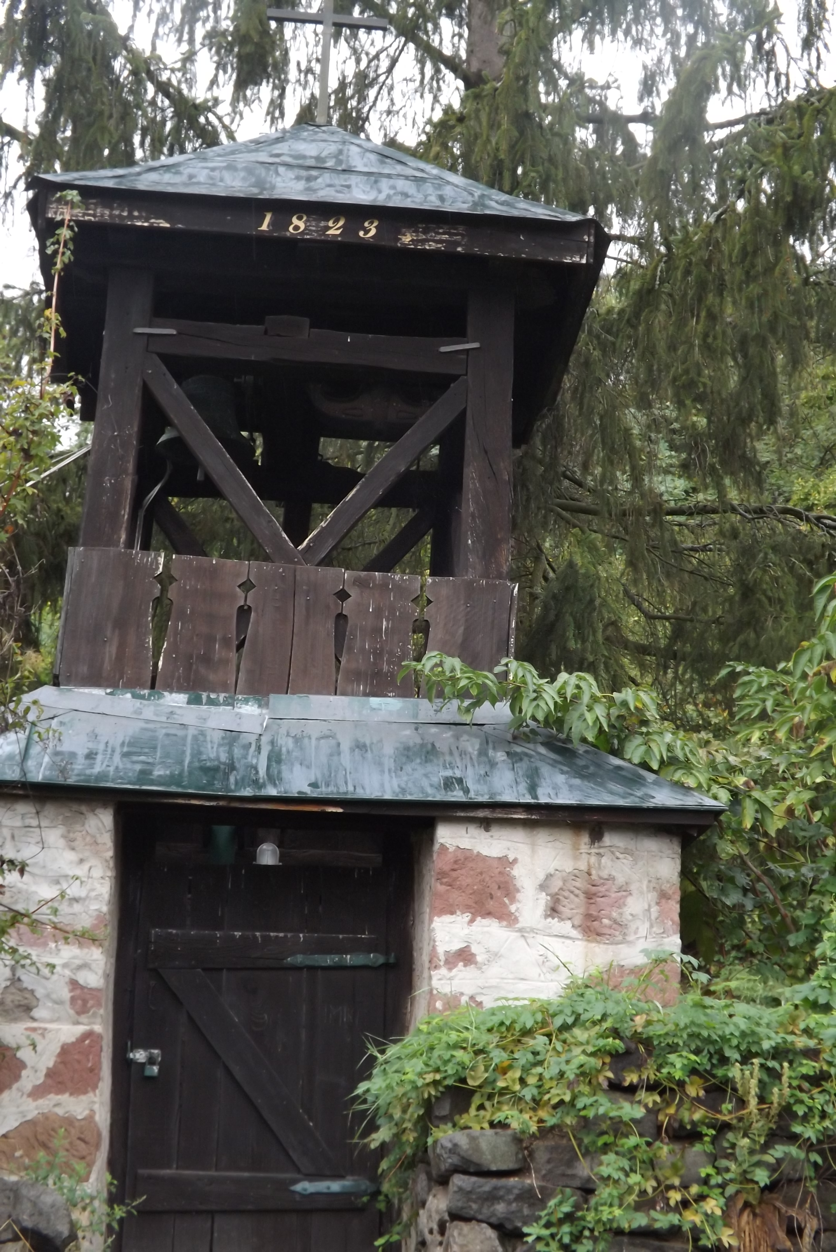 Harangláb Latorpusztán, 1823-as évszámmal